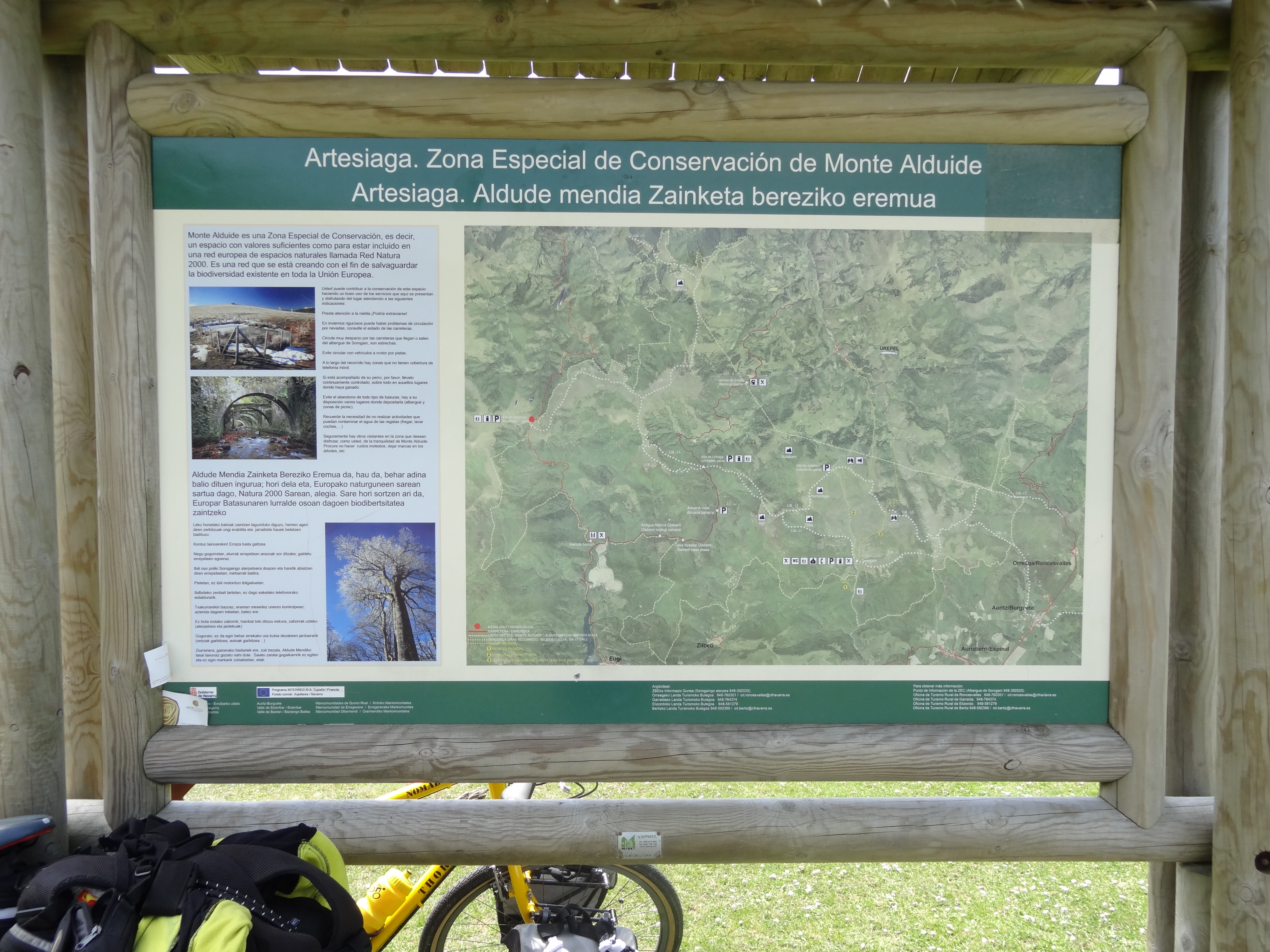 Artesiaga